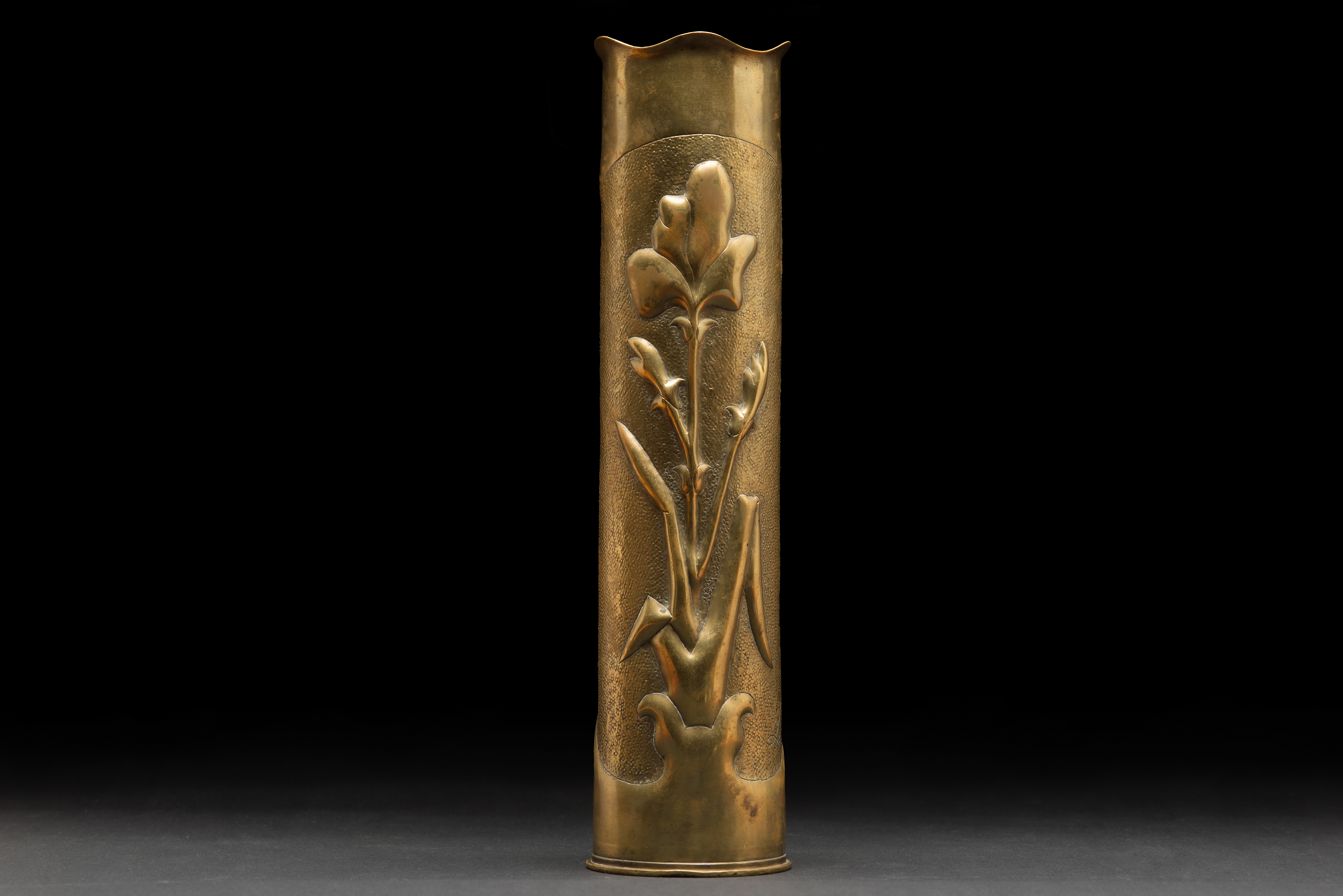 Granatenvase